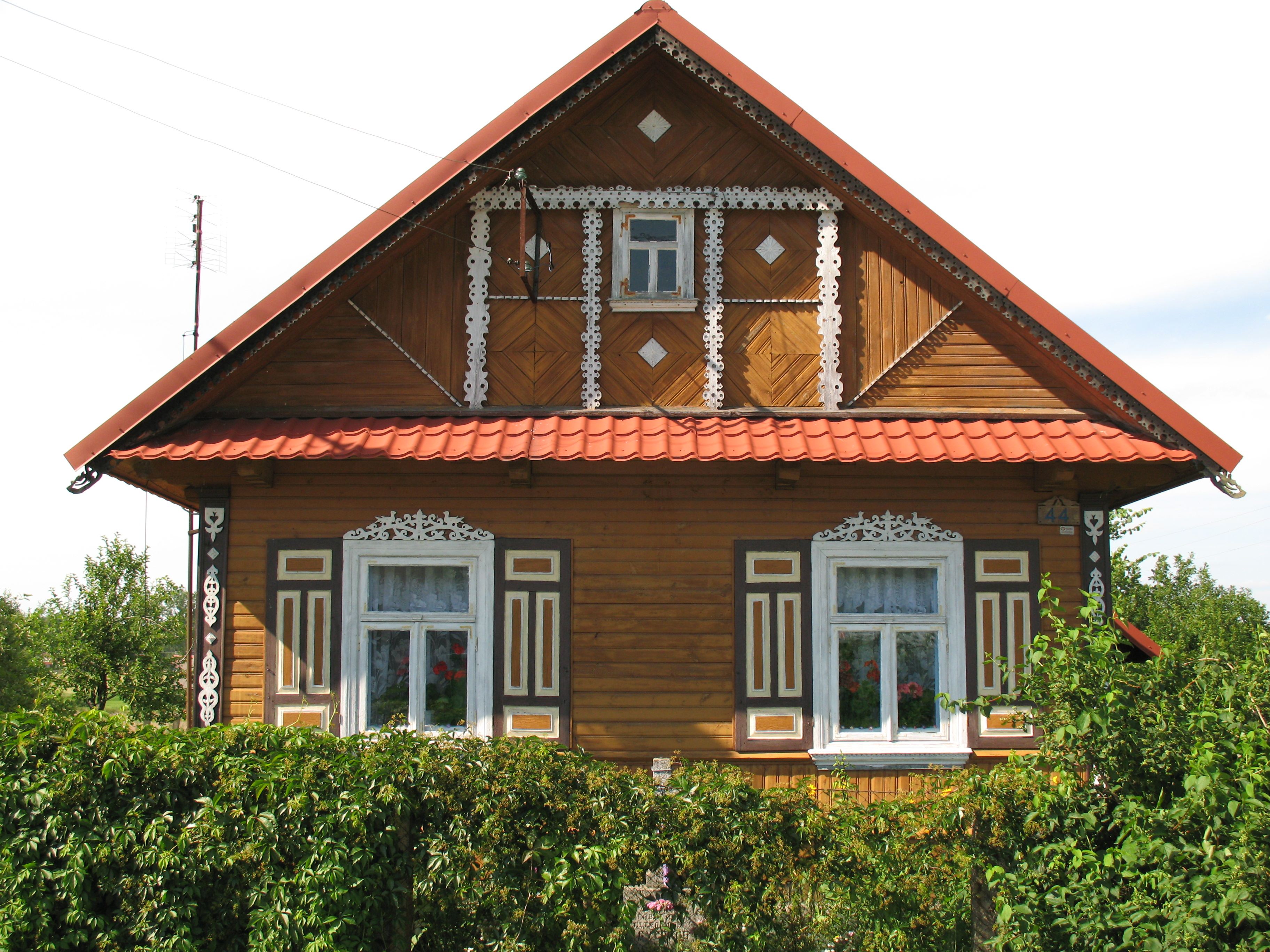 Jeden z drewnianych domów pośrodku wsi Soce. Uwagę przyciąga ciekawa ornamentyka, która stanowi coraz rzadszy widok w podlaskich wsiach...